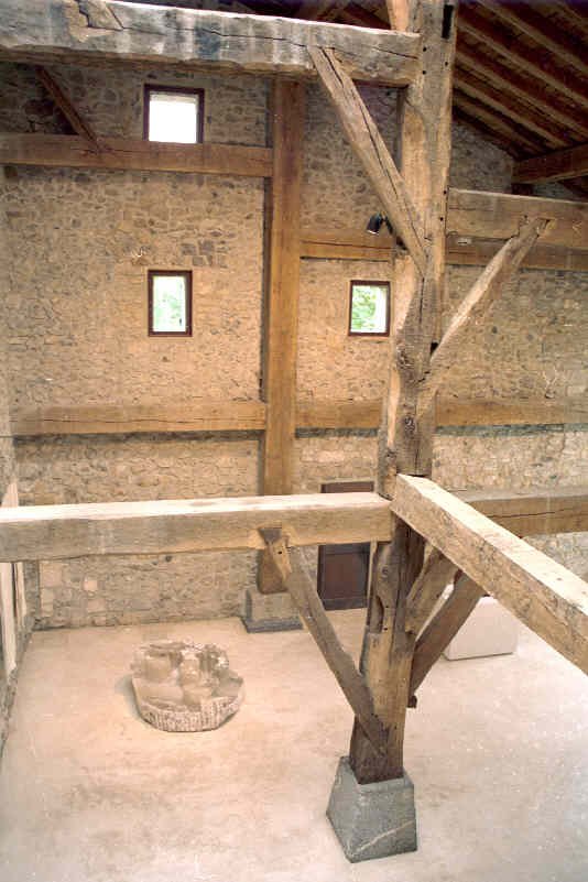 Casona de Chillida-Leku, museo del genial escultor Eduardo Chillida en Hernani, provincia de Guipúzcoa (España). Tomada por JMSE el 7 de julio de 2003 y cedida a Wikipedia. En el museo de Chillida-Leku está permitido tomar imágenes, por lo que entiendo que esta fotografía tomada por mi no tiene ningún problema de Copyright. --JMSE 13:45 29 ago, 2004 (CEST) Categoría: España (imagen) Categoría: Escultura (imagen)